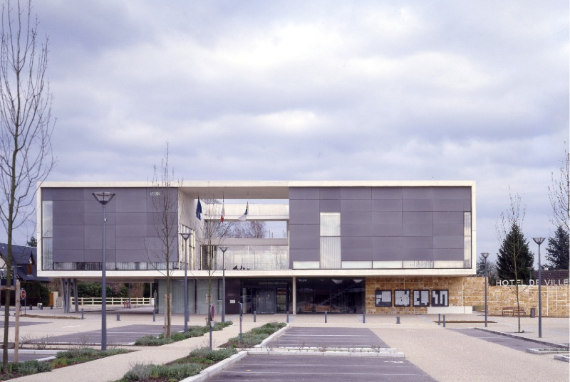 richard et schoeller